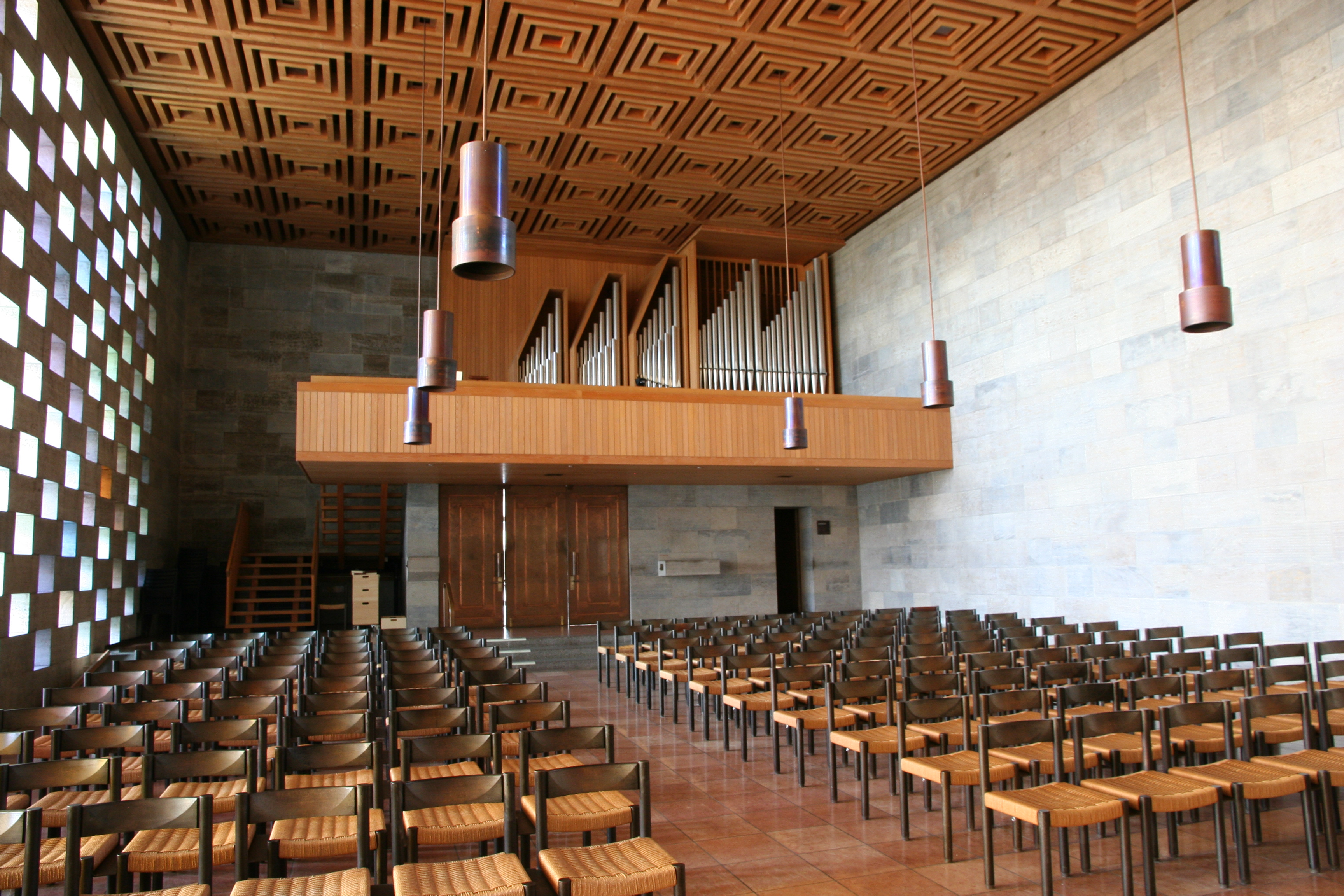 Krematorium Nordheim Zürich